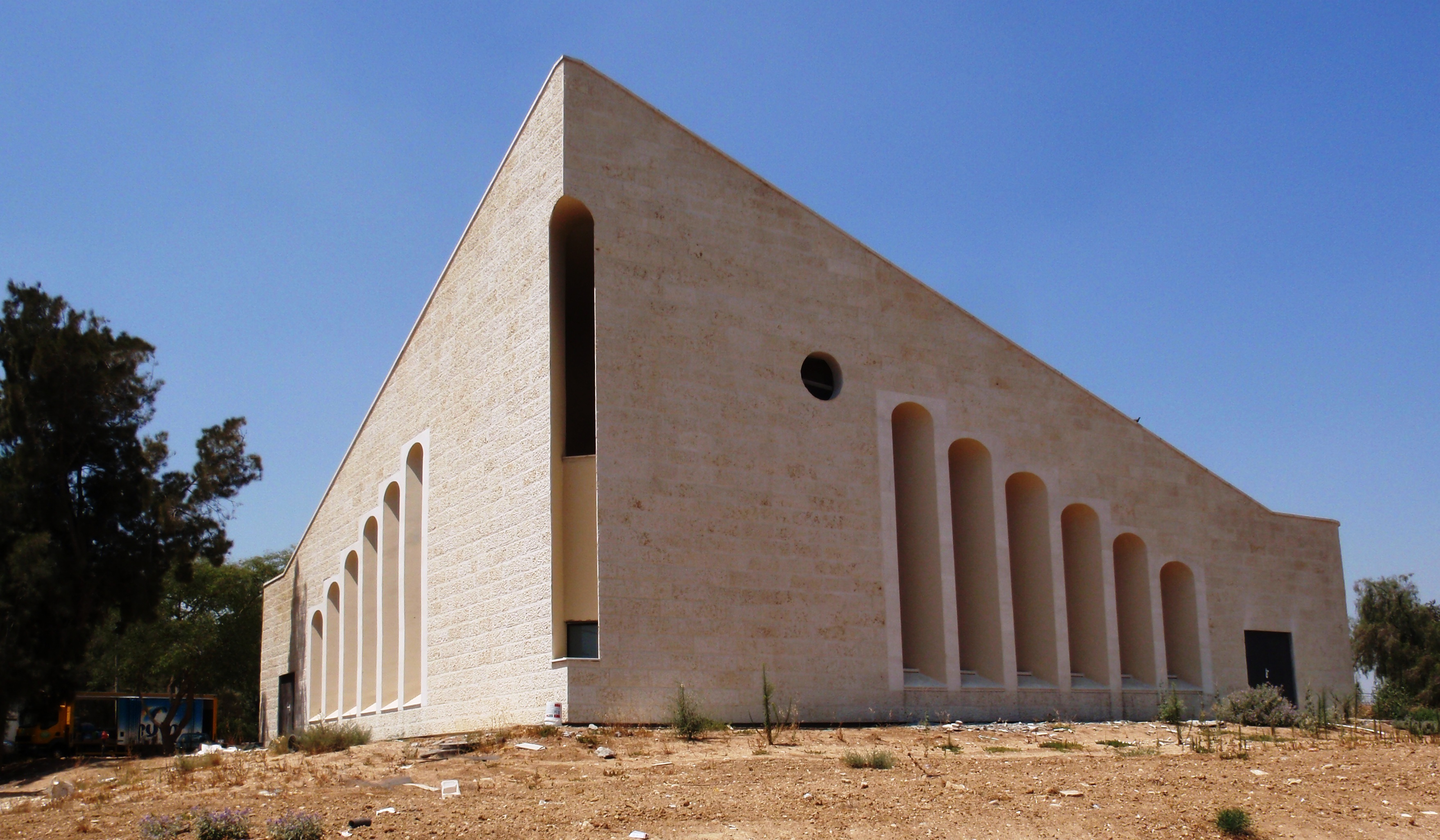 Moshavim בית הכנסת בתקומה